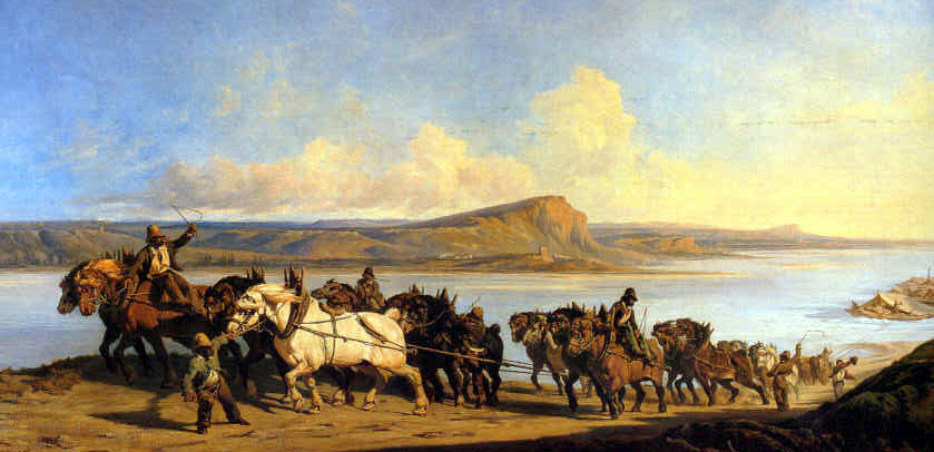 Serrières (Ardèche) battellerie